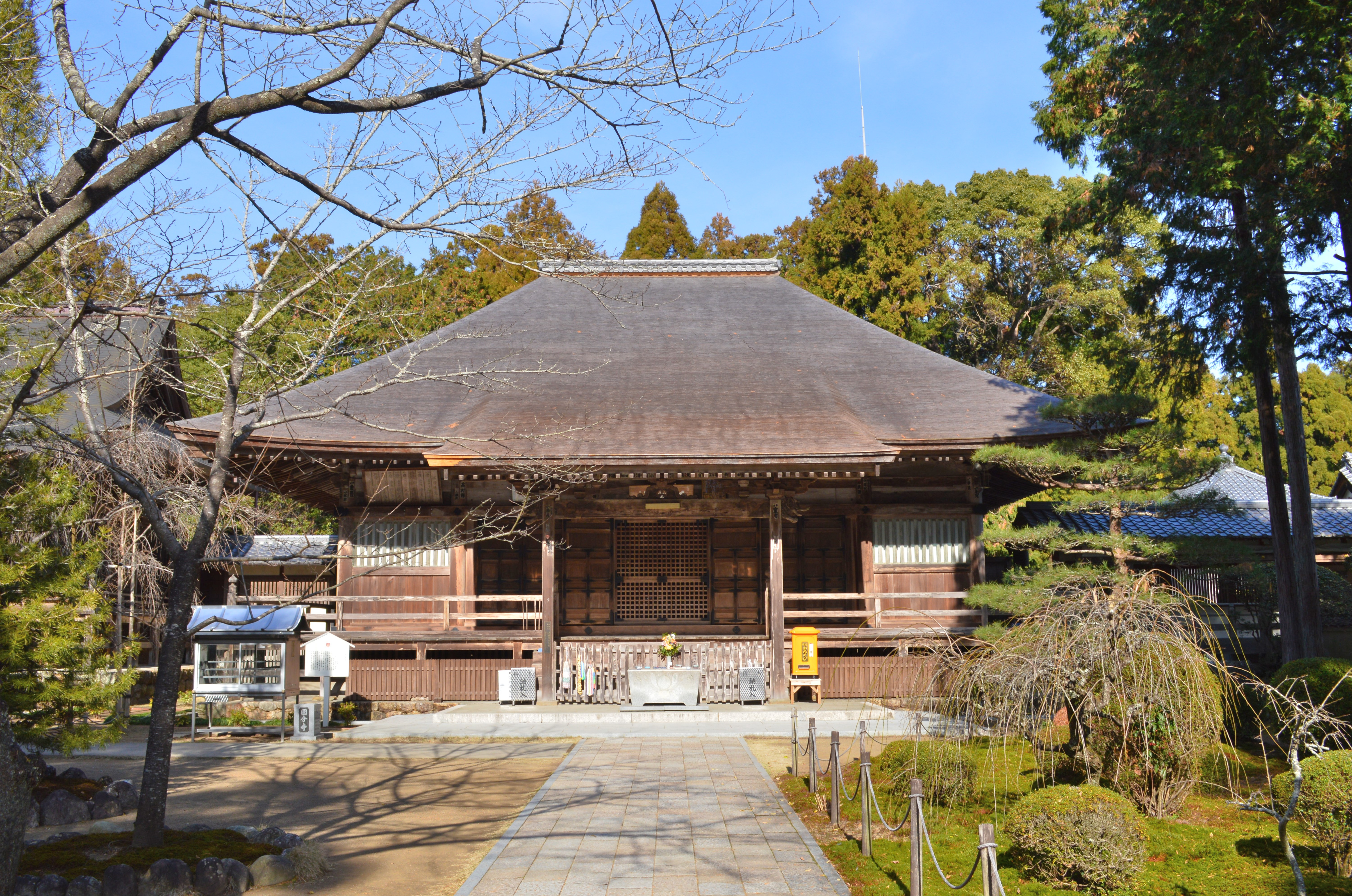 土佐国分寺 本堂